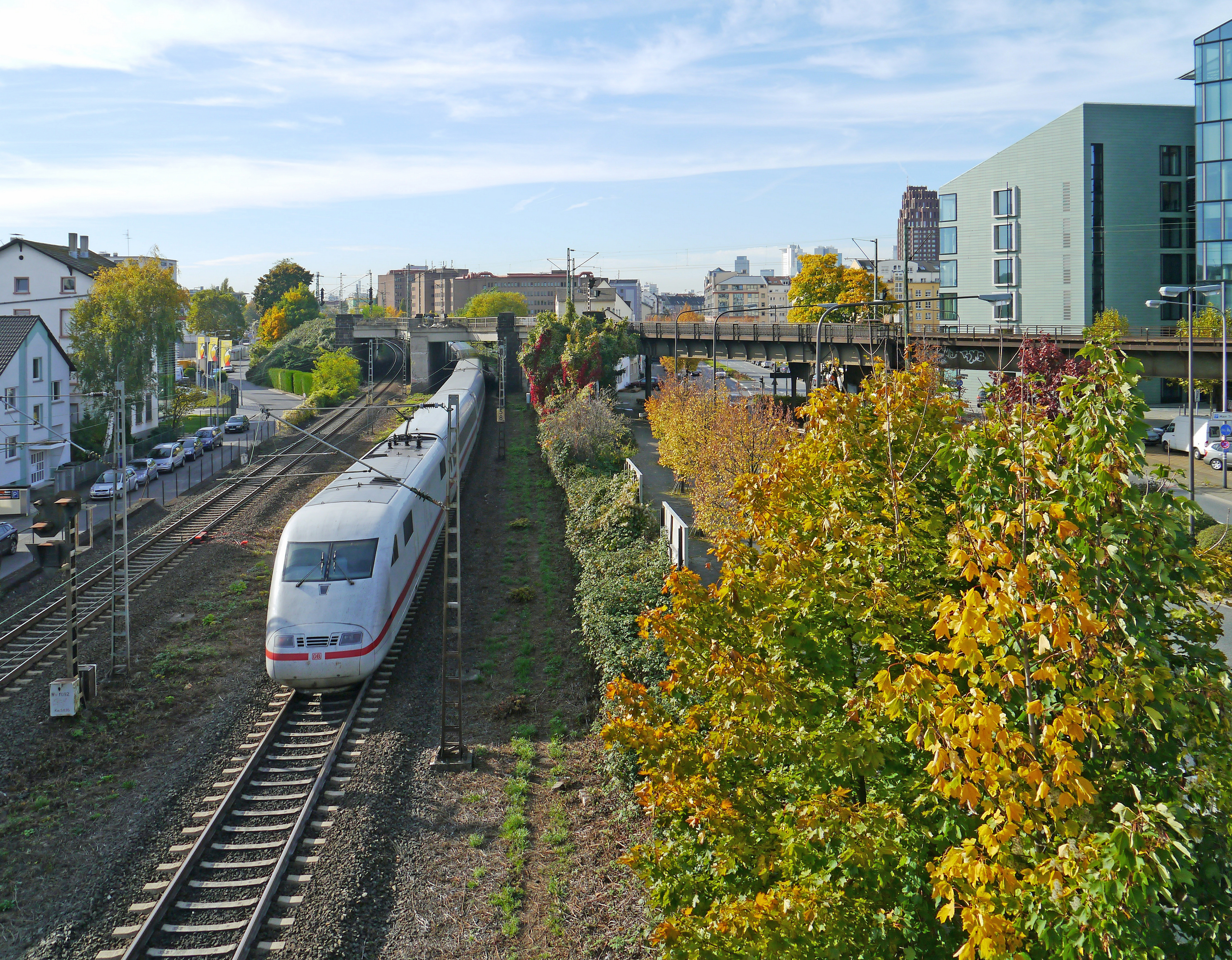 Ein ICE (2012) auf der Fahrt von Hanau-Hauptbahnhof und kurz vor Frankfurt-Südbahnhof auf der südmainischen Strecke, unterquert in Frankfurt-Sachsenhausen die nordmainischen Strecke (Anfahrt zur Deutschherrnbrücke und Frankfurt-Ost).